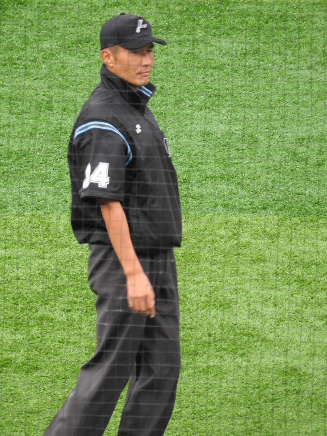 2019年10月6日横浜スタジアムにて